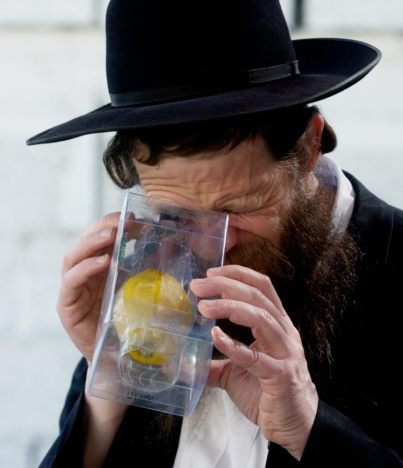 An ultra- Orthodox Jew inspects an etrog at the Four Species Market in Jerusalem's Mea She'arim neighborhood. GPO photo by Mark Neyman. חג הסוכות. בצילום, יהודי חרדי בוחן אתרוג, בשוק ארבעת המינים בשכונת מאה שערים בירושלים.